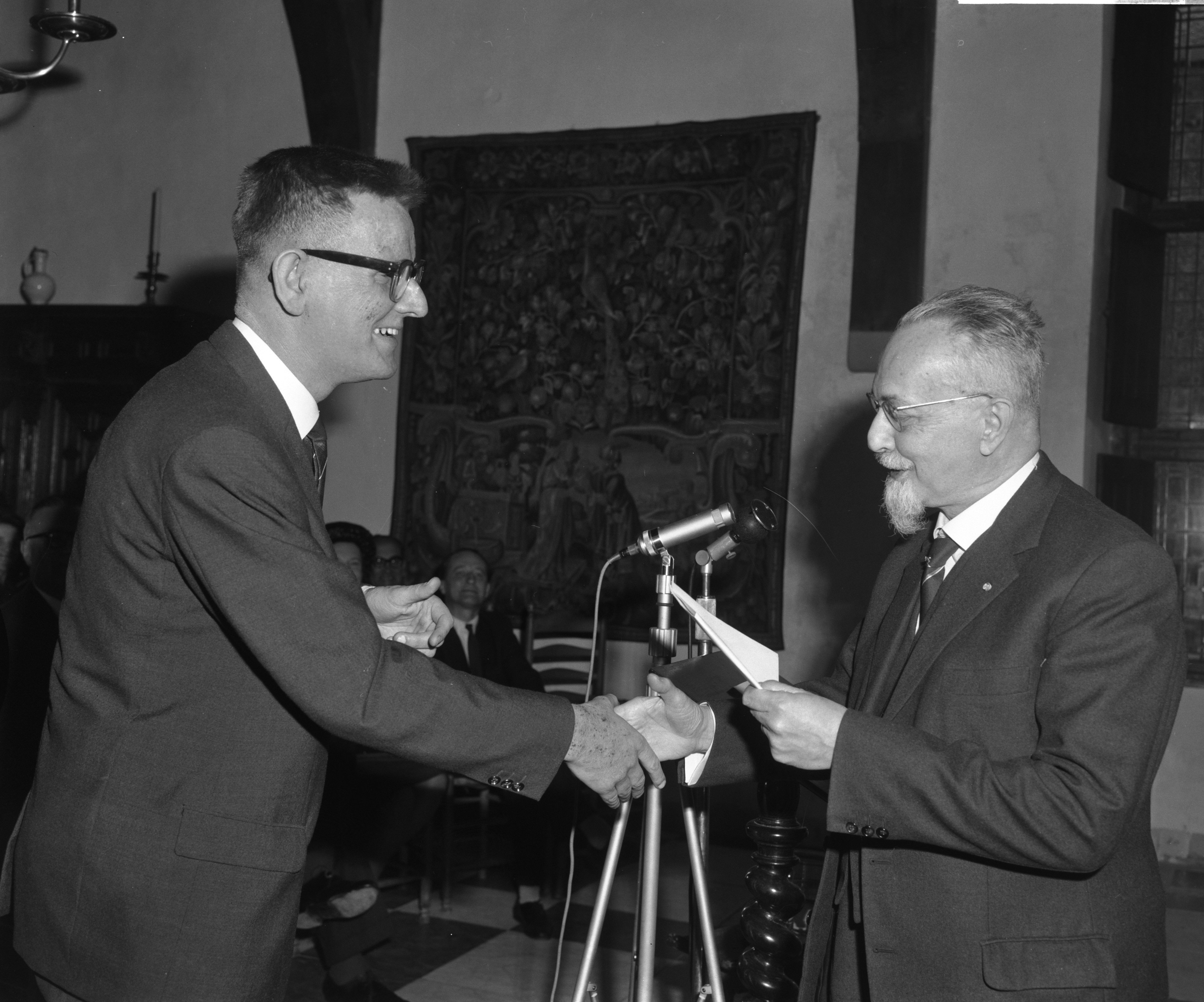 Collectie / Archief : Fotocollectie Anefo Reportage / Serie : [ onbekend ] Beschrijving : Prijs voor Literaire Kritiek voor Kees Fens Datum : 4 april 1962 Fotograaf : Bilsen, Joop van / Anefo Auteursrechthebbende : Nationaal Archief Materiaalsoort : Negatief (zwart/wit) Nummer archiefinventaris : bekijk toegang 2.24.01.04 Bestanddeelnummer : 913-7288